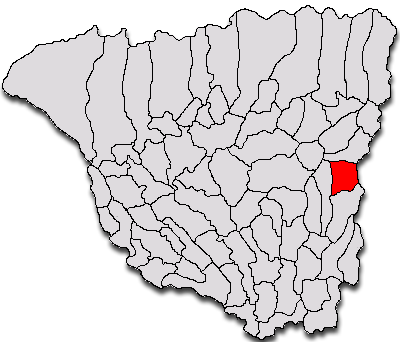 Categorie:Hărţi ale judeţului Gorj